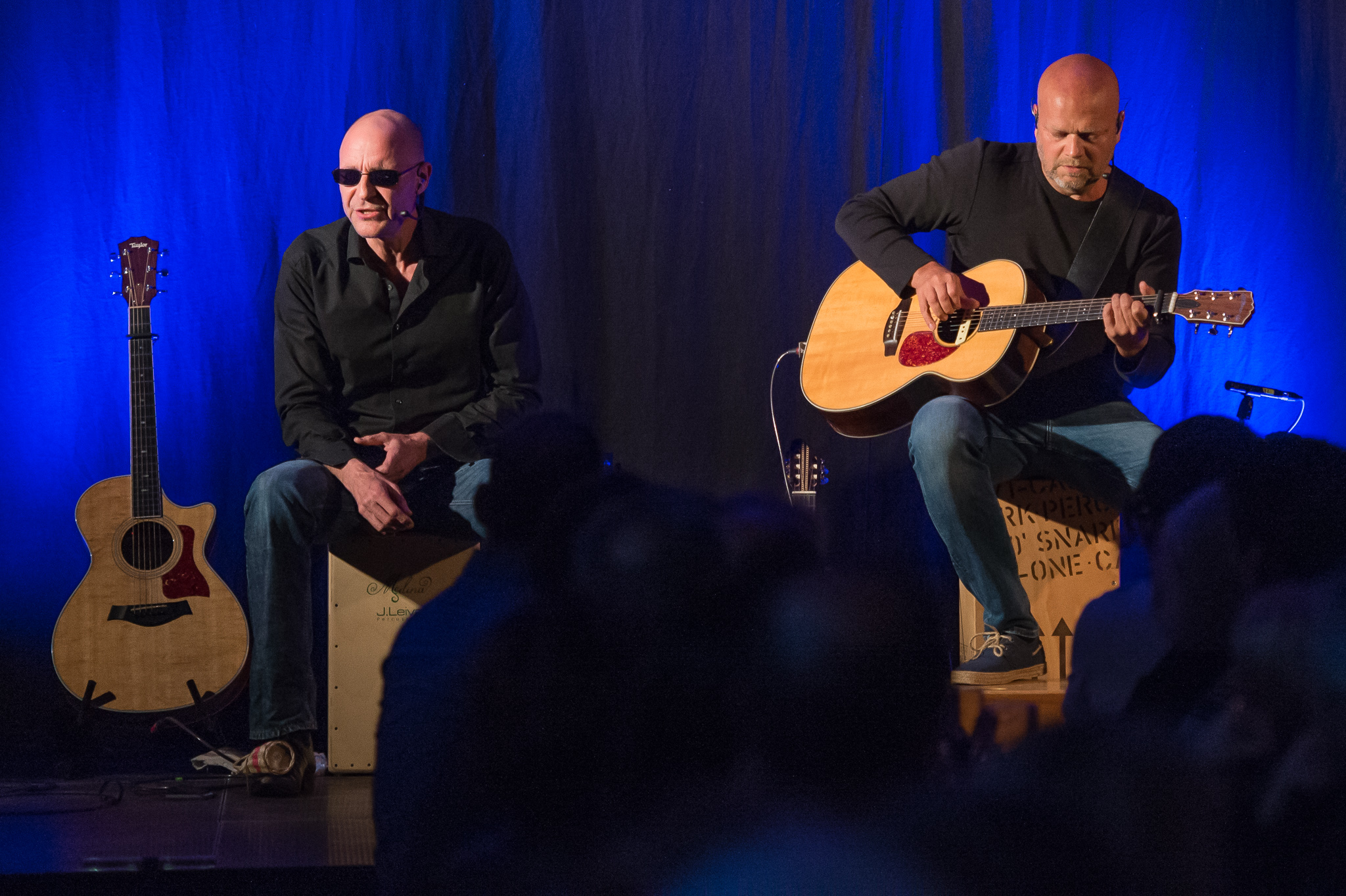 Concertbüro Franken,Die Feisten,Gutmann am Dutzendteich,Konzert,Livekonzert,Livemusik,Mathias Zeh,Rainer Schacht